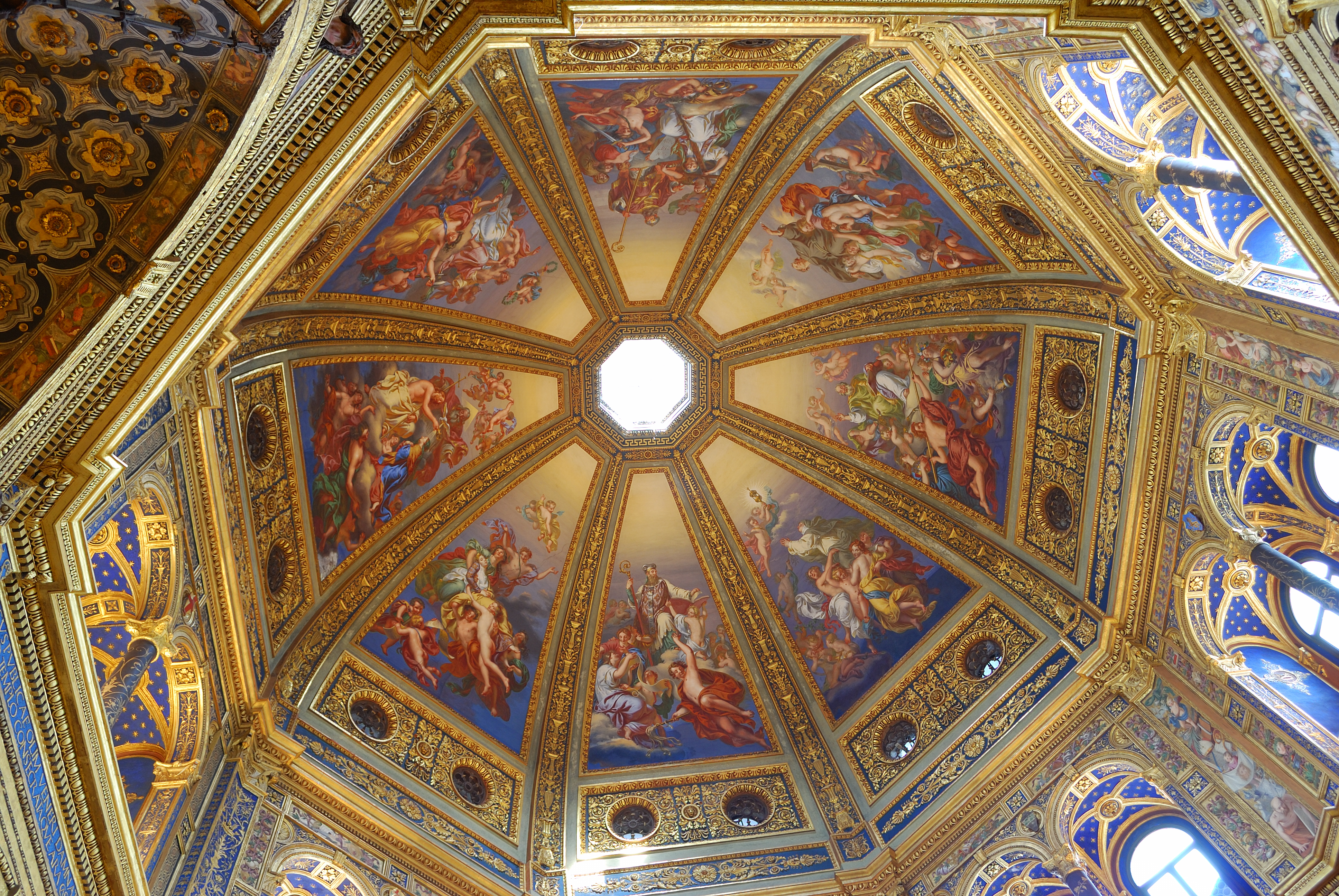 The interior dome of the Tempio Civico della Beata Vergine Incoronata in Lodi, Italy